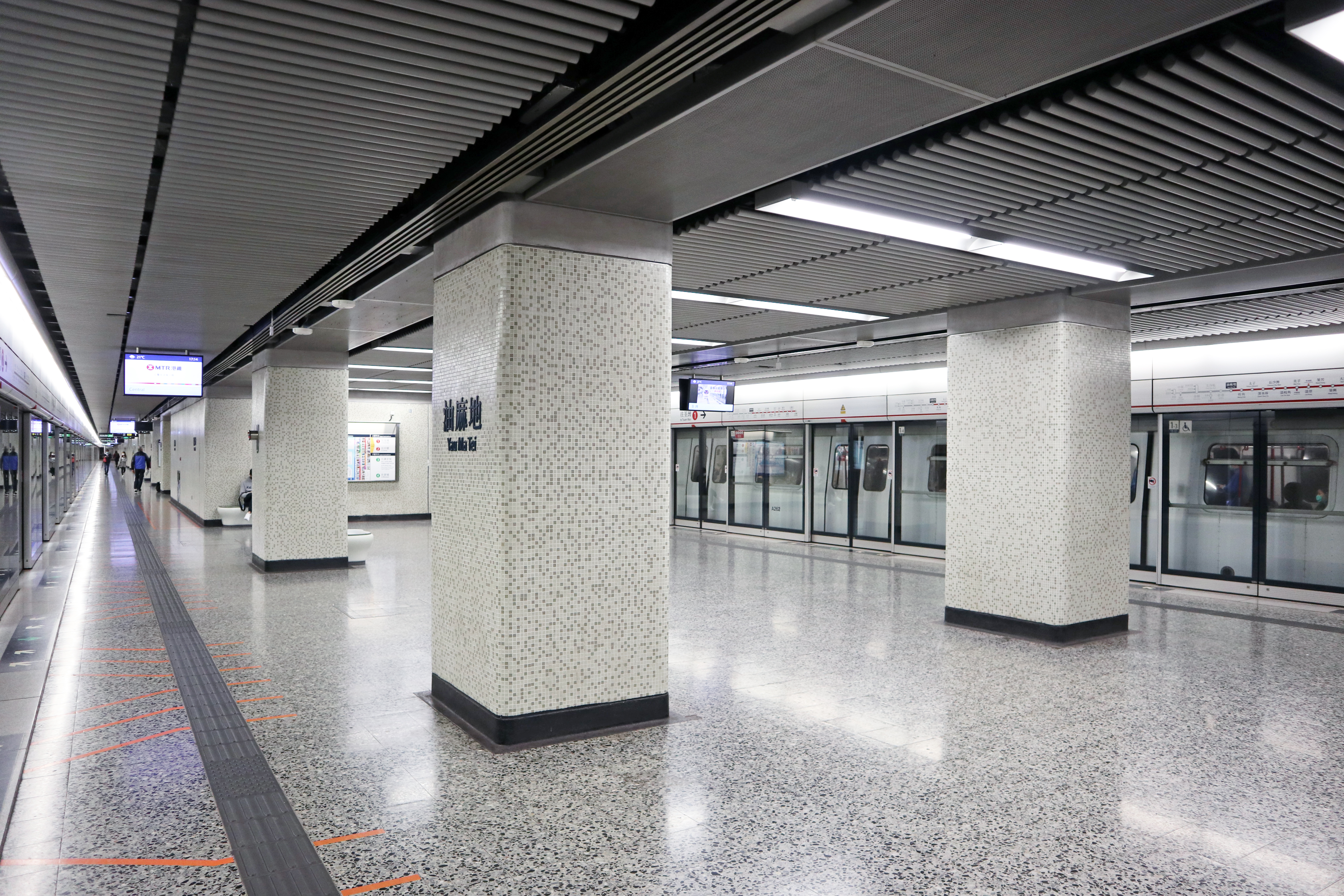 港鐵油麻地站月台